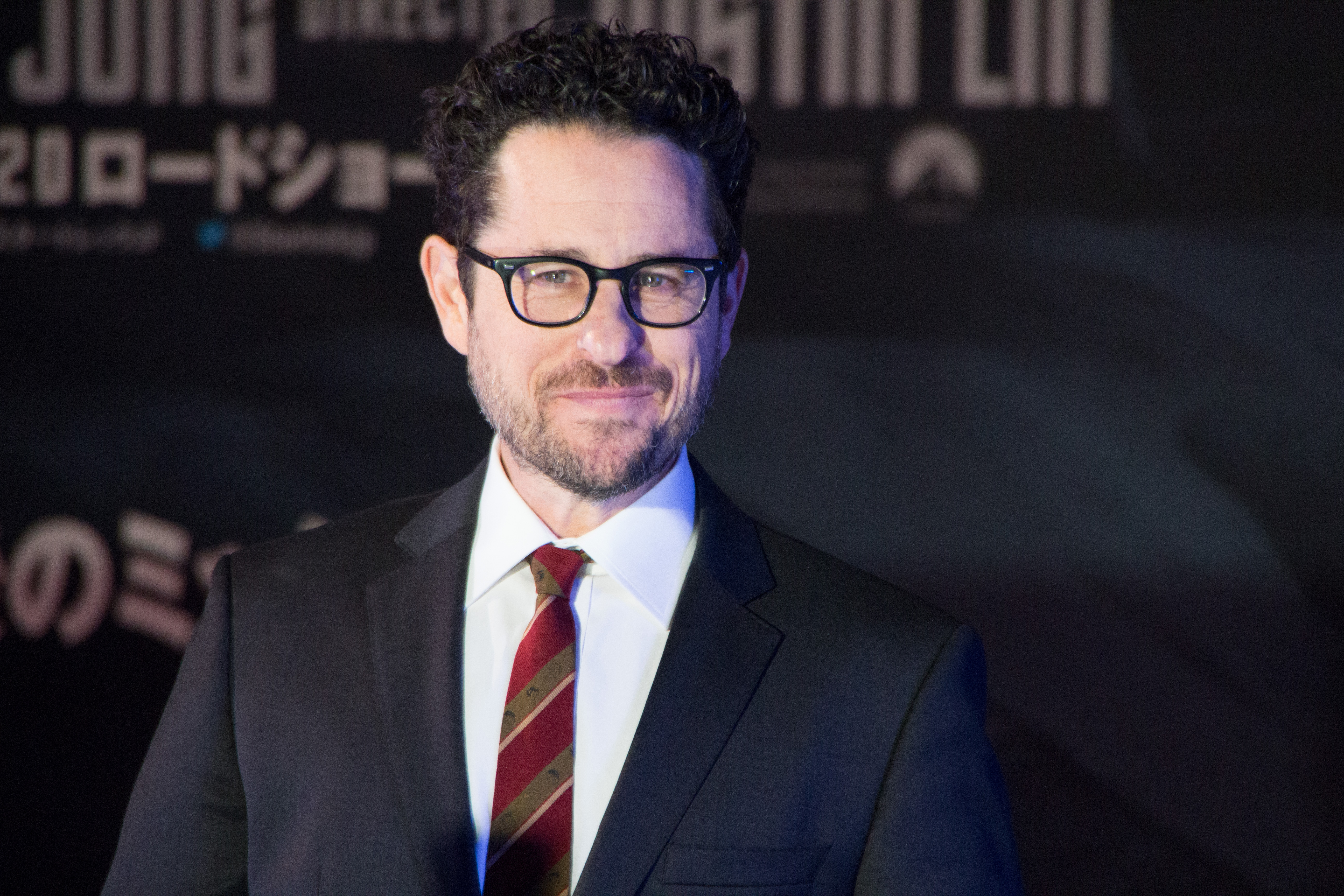 スター・トレック BEYOND ジャパン・プレミア レッドカーペット J・J・エイブラムス